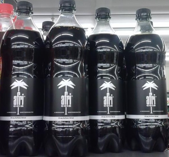 Afri-Cola-Flaschen in einem deutschen Supermarkt